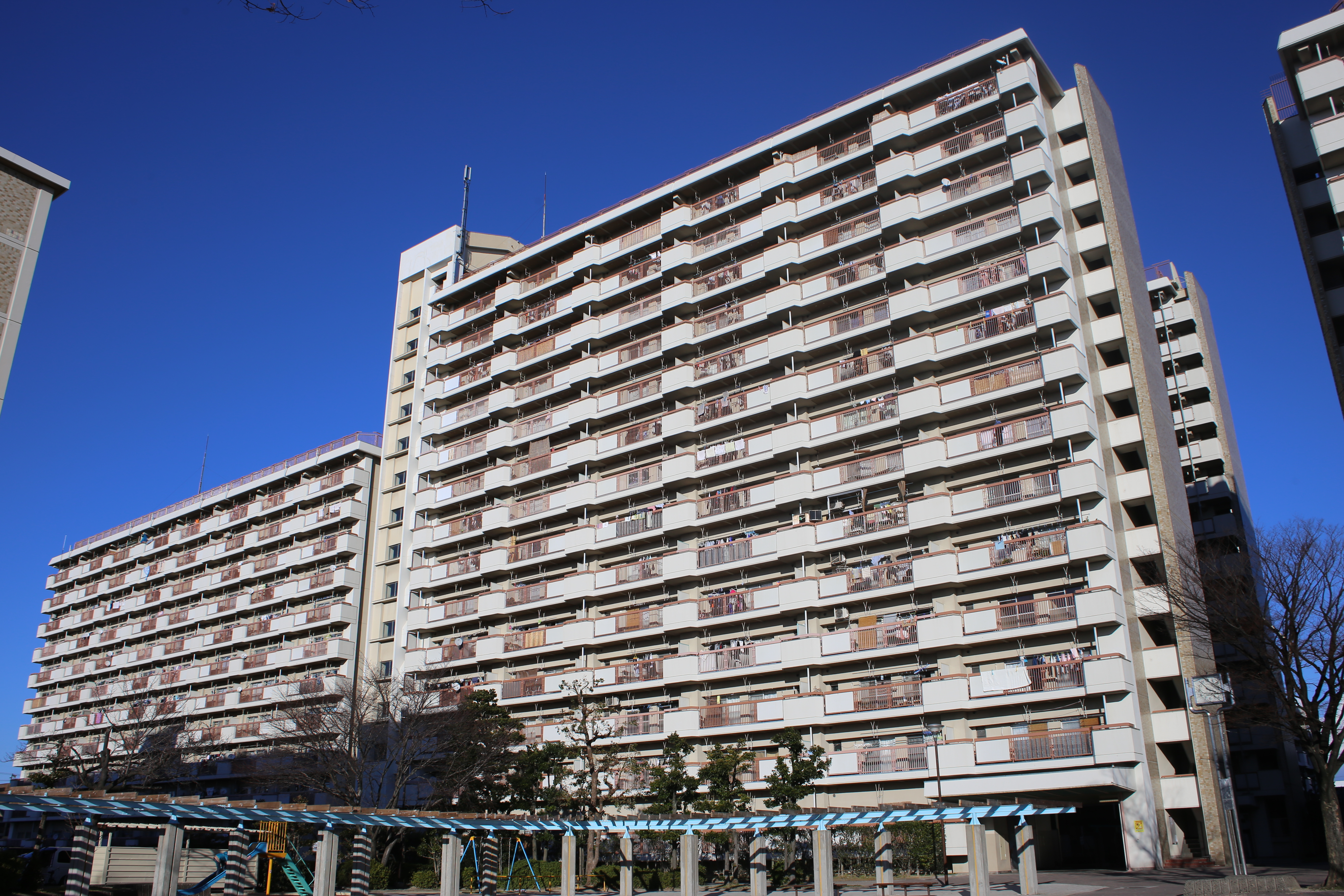 名古屋市北区水草町のUR水草団地